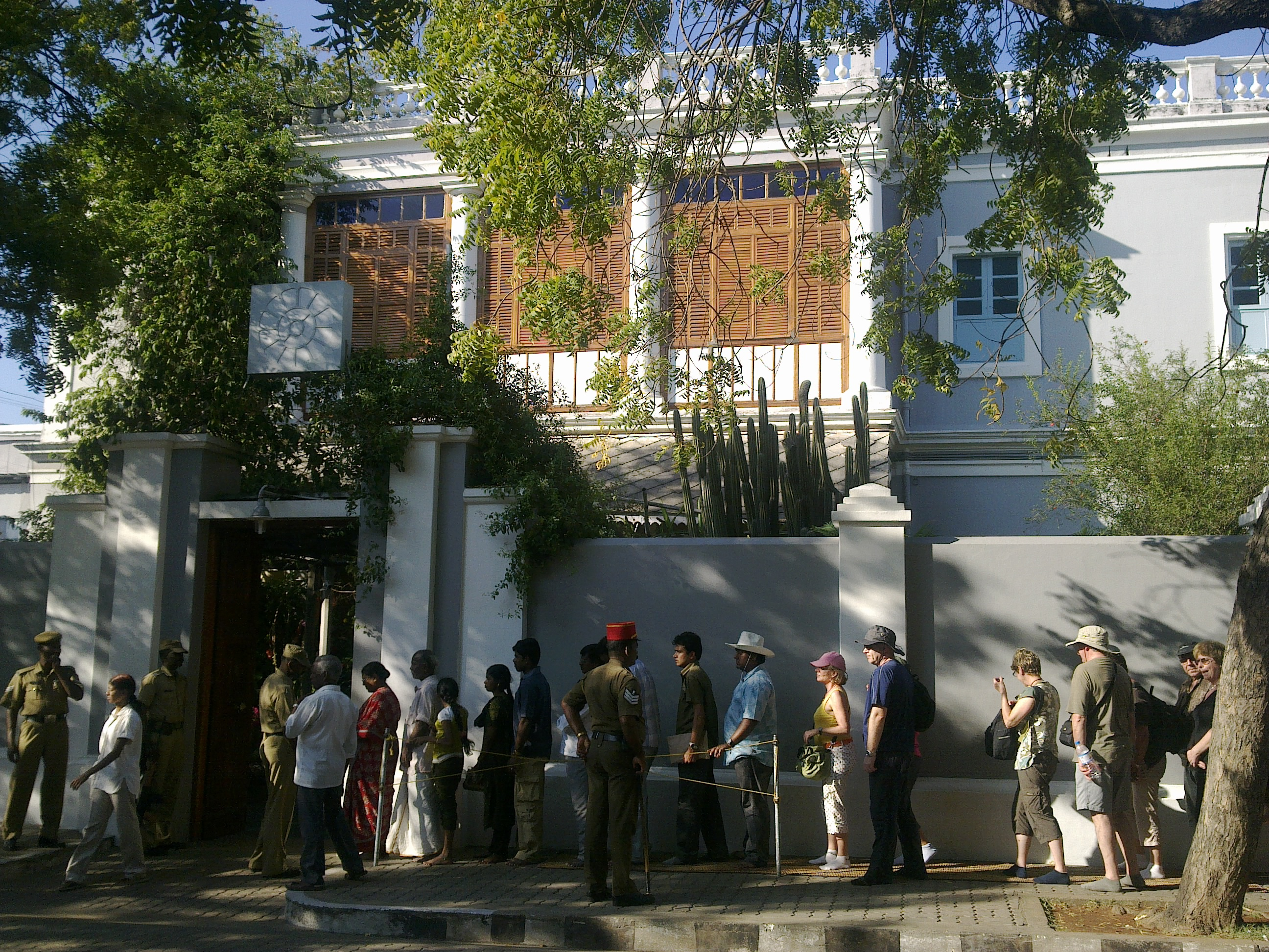 അരൊബിന്ദോ ആശ്രമം - പോണ്ടിച്ചേരി